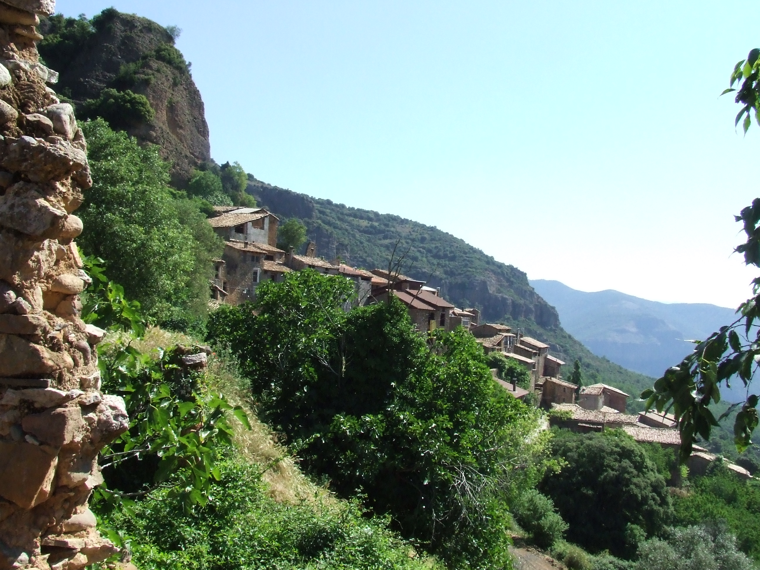 Lloc on hi hagué el castell de Serradell (Toralla i Serradell, Conca de Dalt, Pallars Jussà)